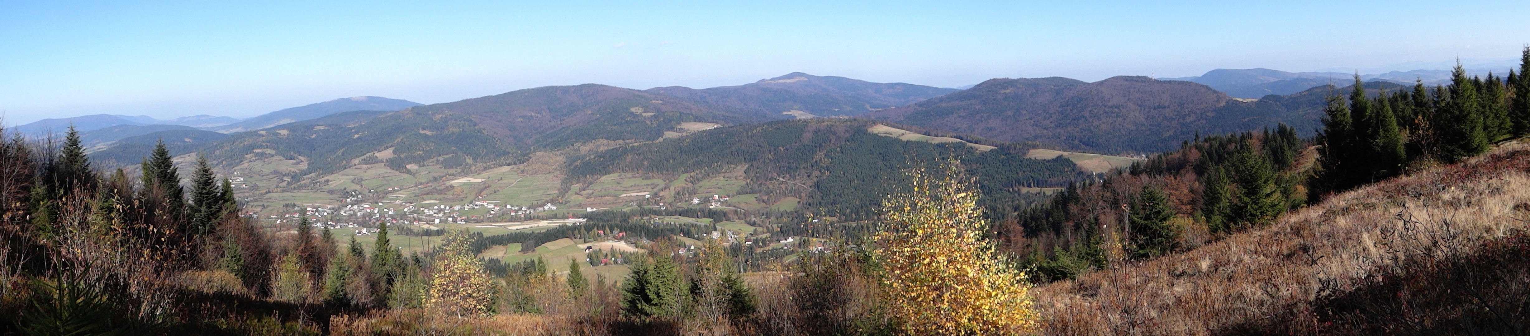 Panorama widokowa z Jaworzynki Lubomierskiej